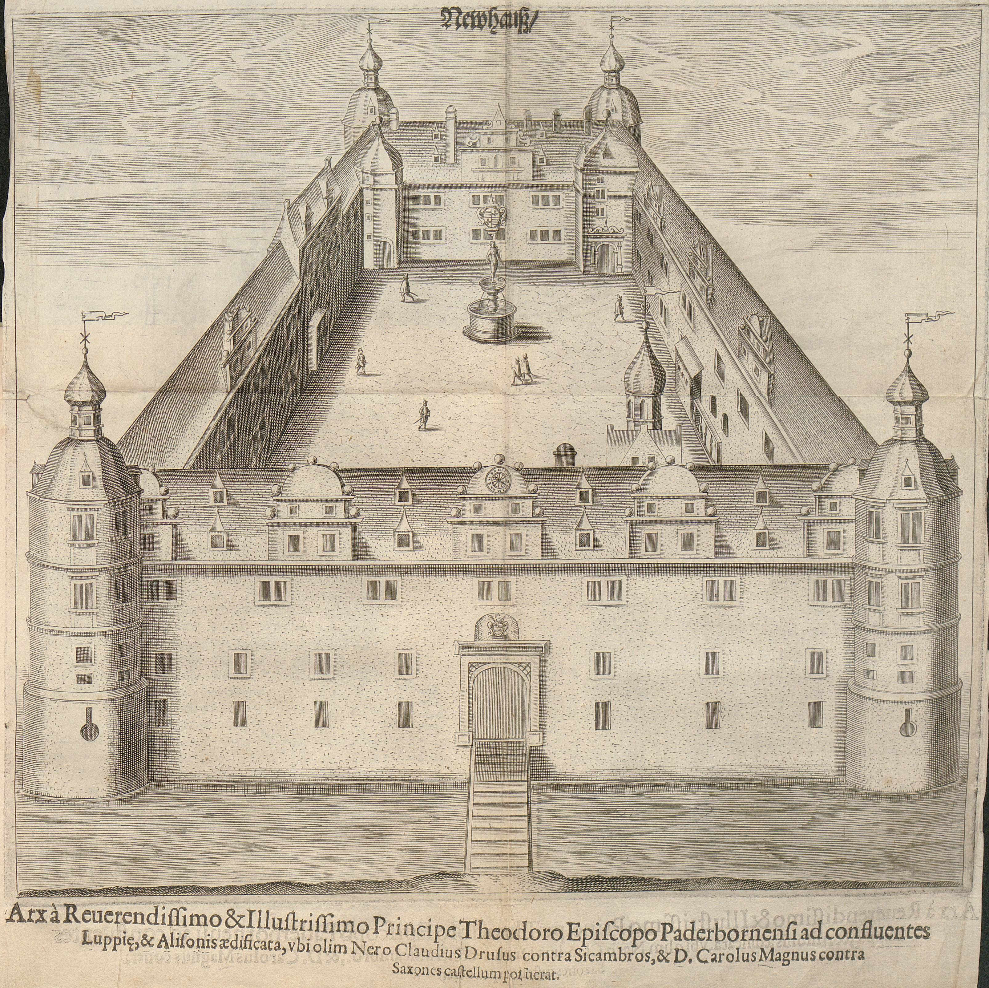 Schoss Neuhaus bei Paderborn